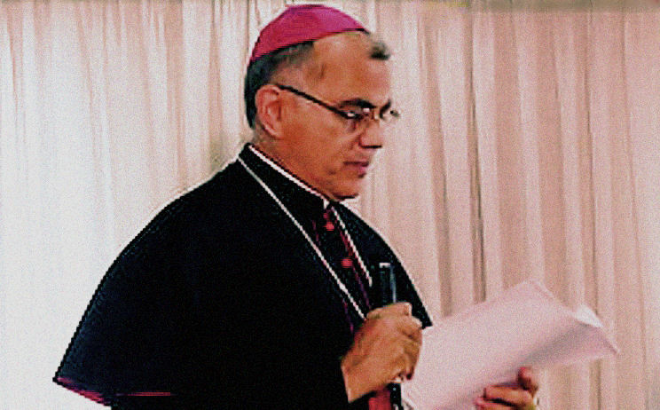 il Signor Vicente Gallardo di Mérida, mio stimato amico ha deciso di rilasciare l'immagine DSCN3706, sotto il Nome Baltazar-Enrique-Porras.jpg, e sotto la licenza cc-by-sa. A Breve arriverà la richiesta del Signor Gallardo.--Lodewijk Vadacchino (msg) 19:07, 7 gen 2010 (CET)